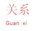 logo caractère guanxi